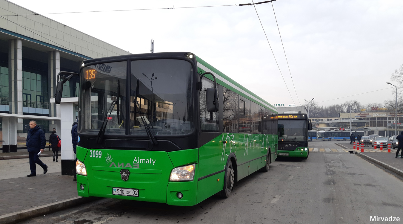 Автобус ЛиАЗ в Алматы